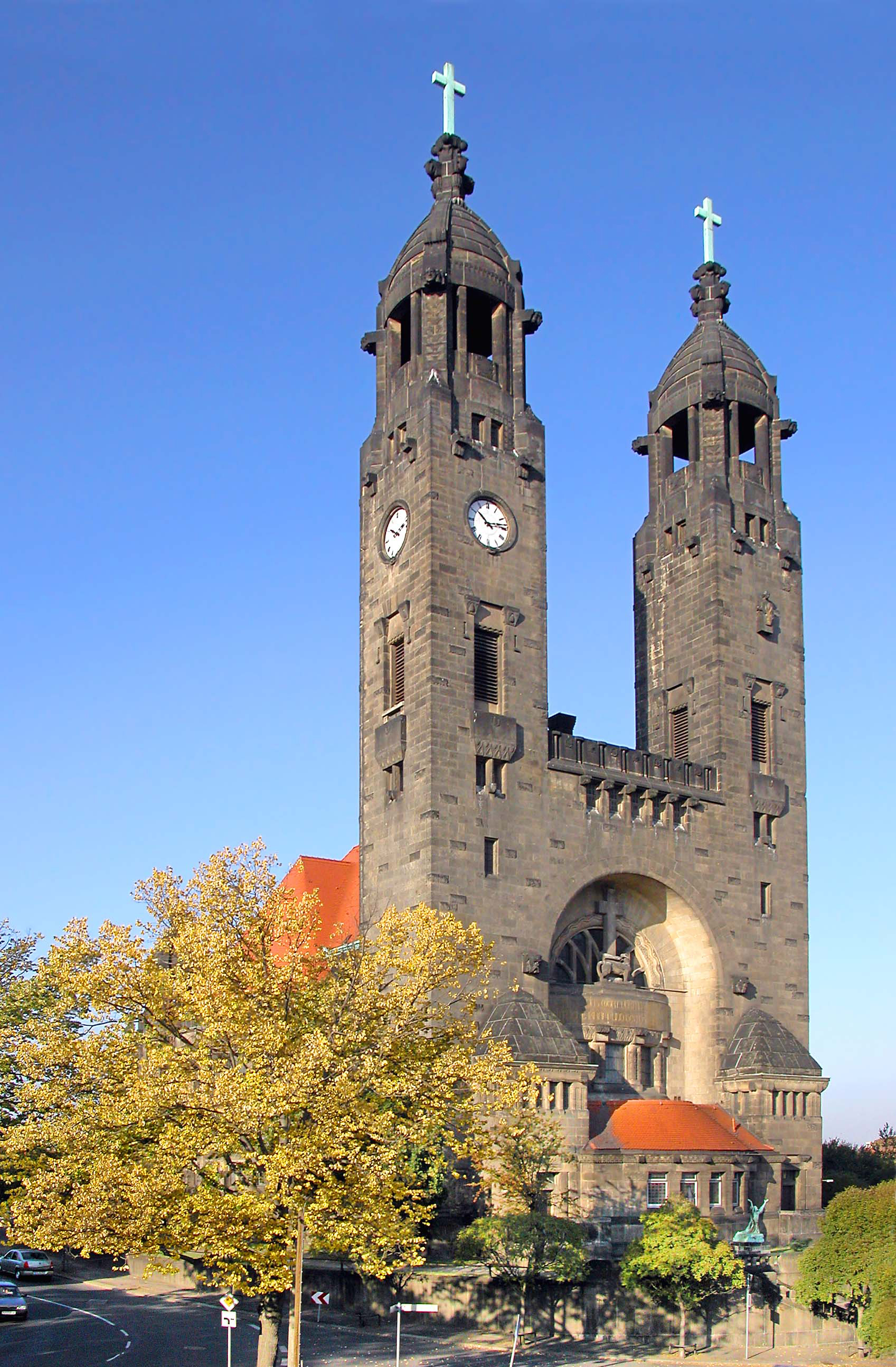 28.10.2006 01219 Dresden-Strehlen, An der Christuskirche (GMP: 51.027314,13.765160): Christuskirche, im Stil der Reformarchitektur 1906 nach Plänen von Schilling & Graebner erbaut. Sicht von Südosten. [DSCN12327.TIF]20061028020DR.JPG(c)Blobelt